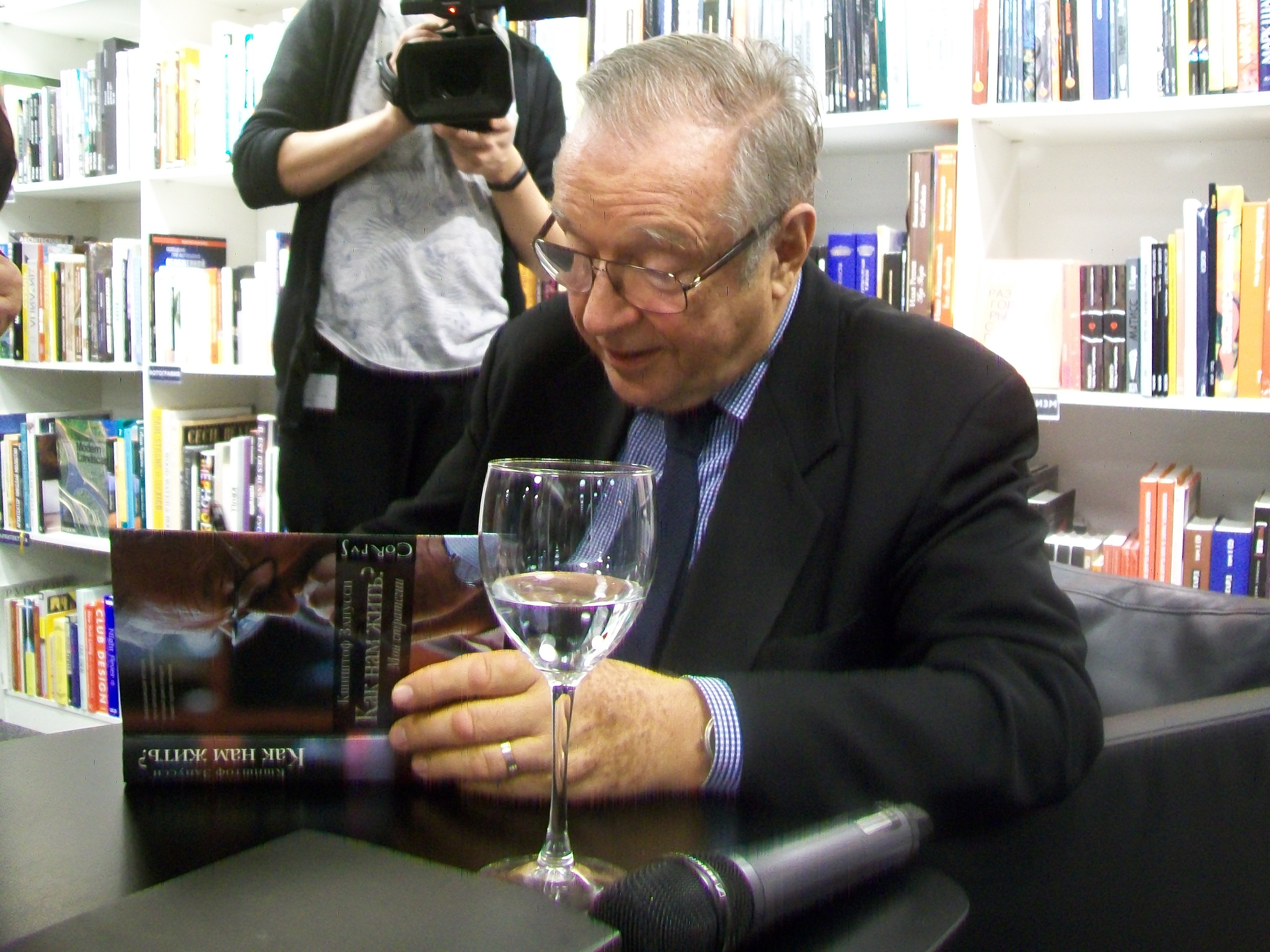 Кшиштоф Занусси подписывает свою книгу в Ельцин-центре. 2017 год